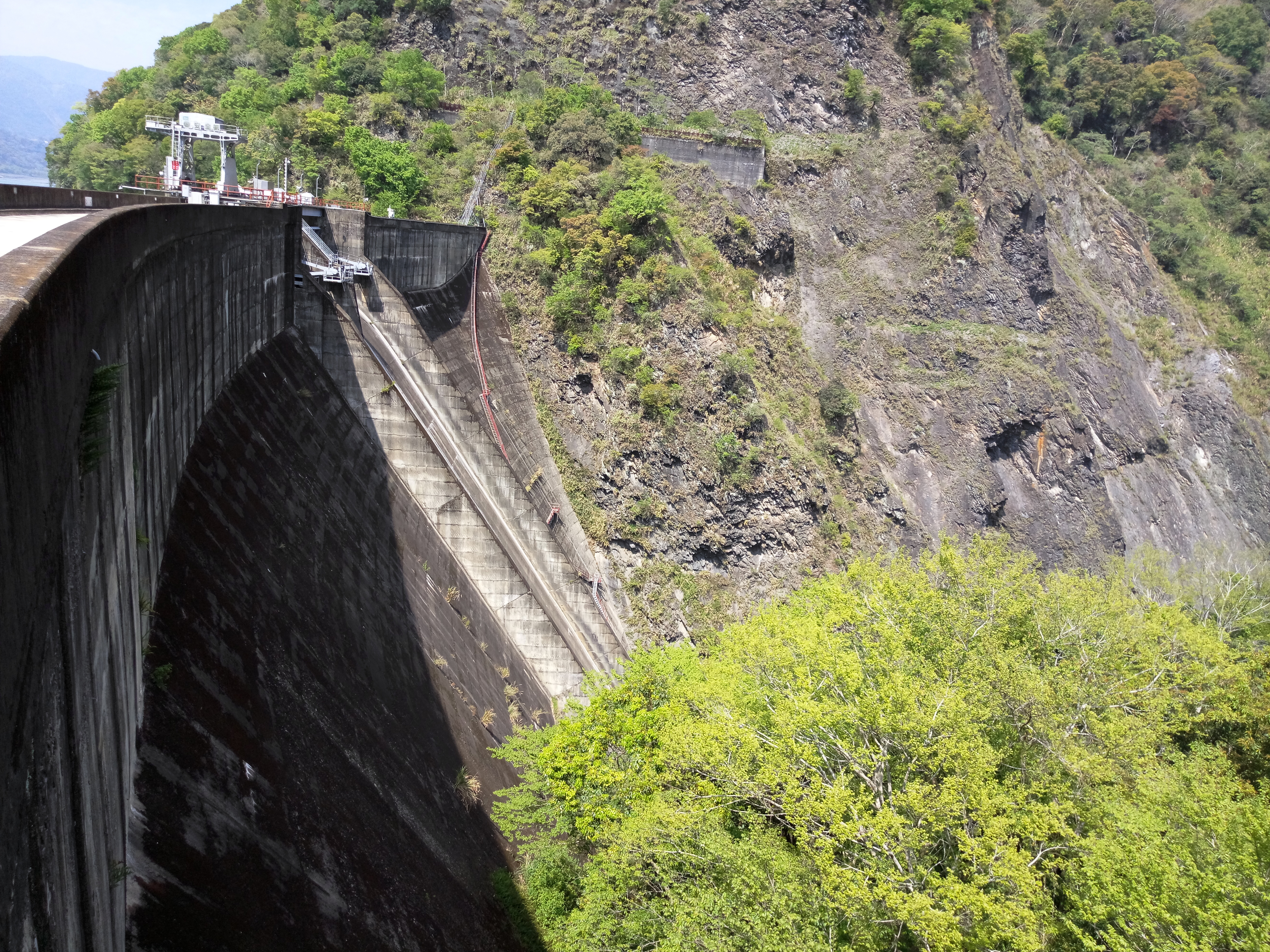 霧社水庫大壩側面